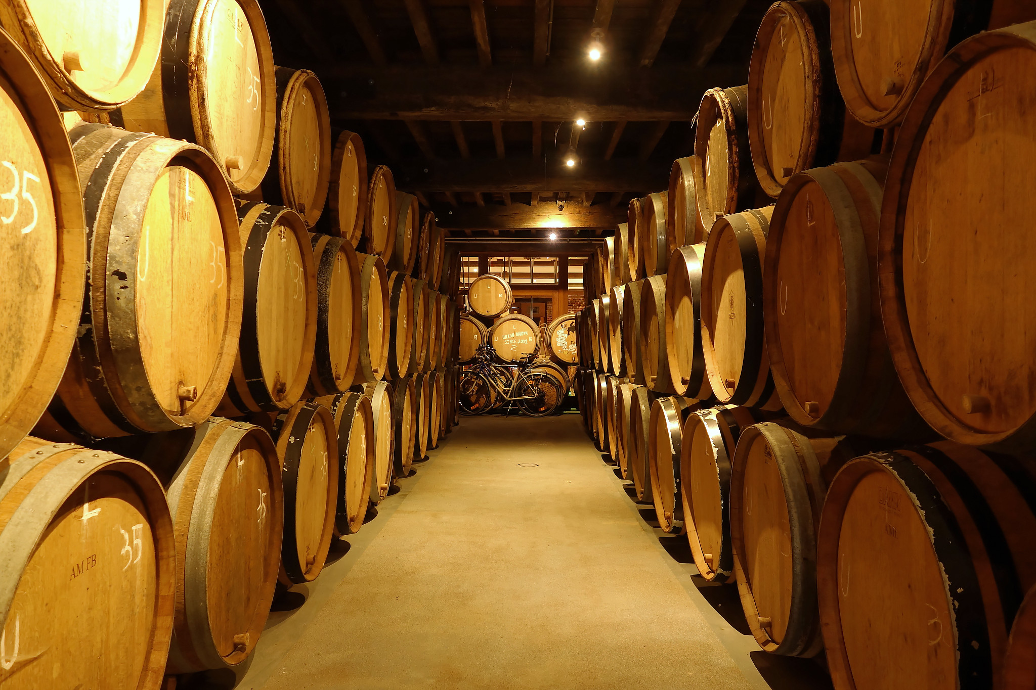 Magasin de futaille à la Brasserie Cantillon.